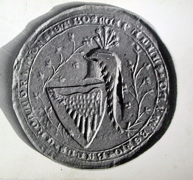 Sigill från den kroatiska adelssläkten Šubić